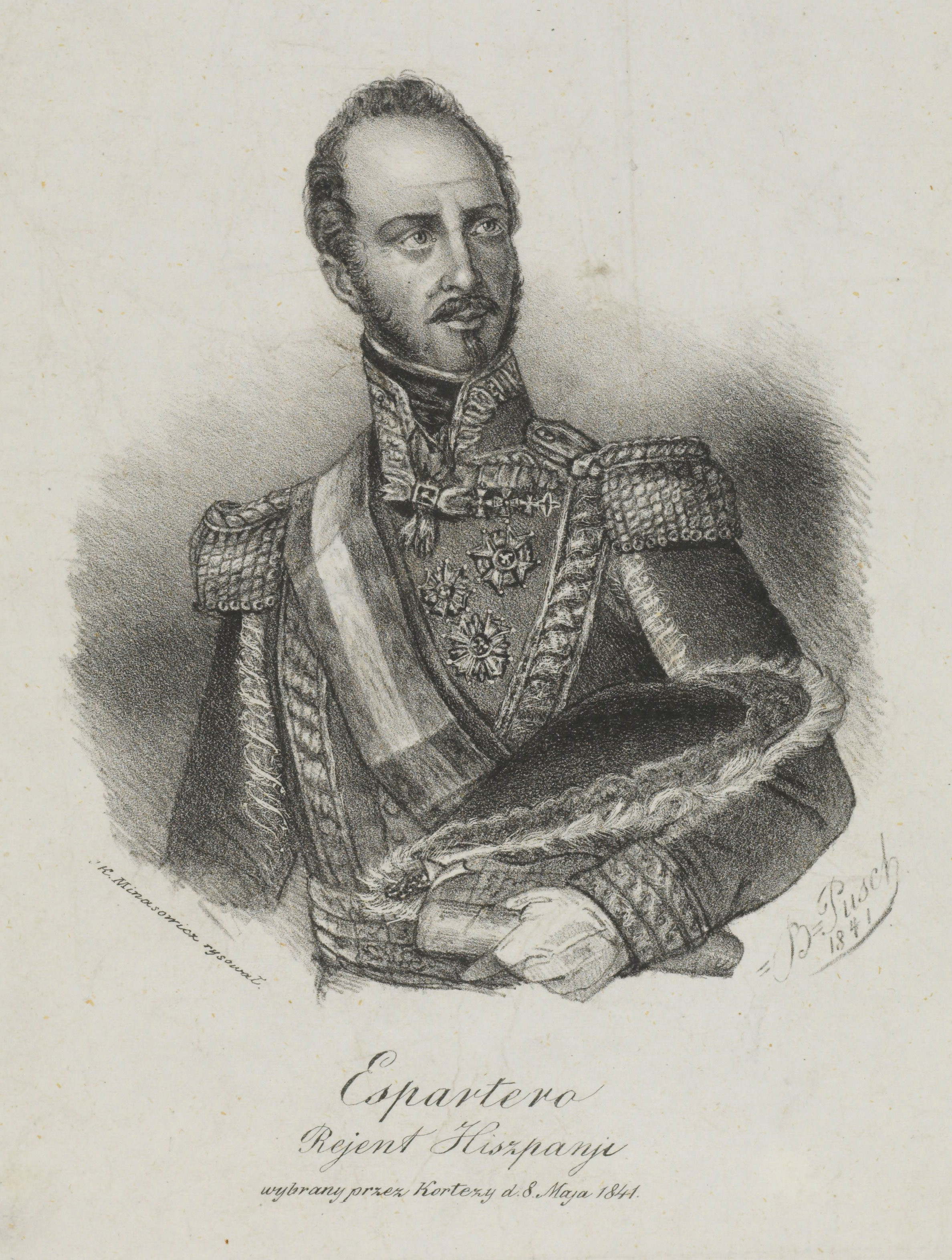 Baldomero Espartero